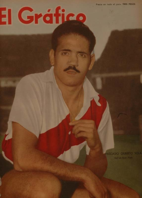 «PASCASIO GILBERTO SOLA, Half de River Plate»